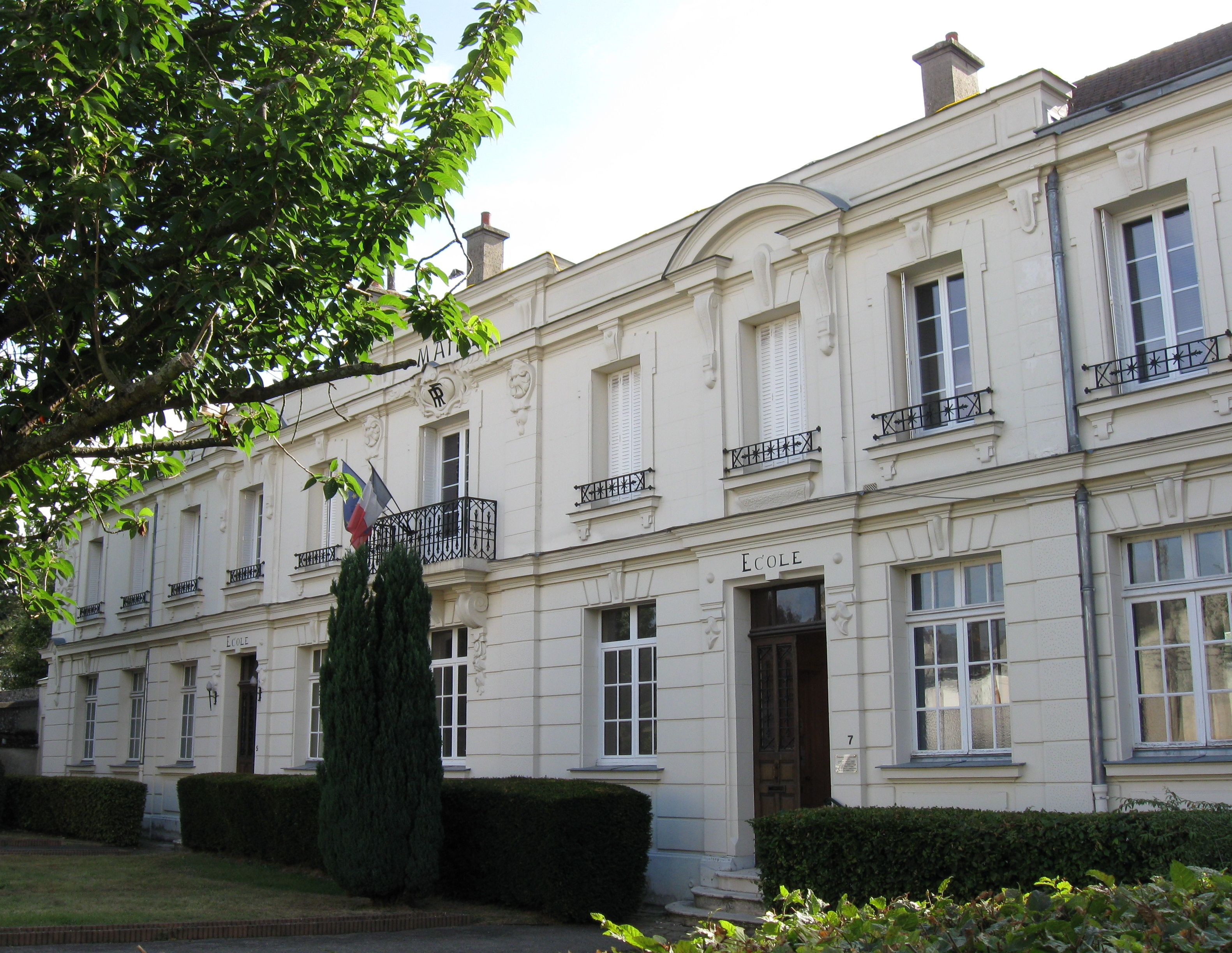 Mairie-école de Favières (département de la Seine et Marne, région Île-de-France)